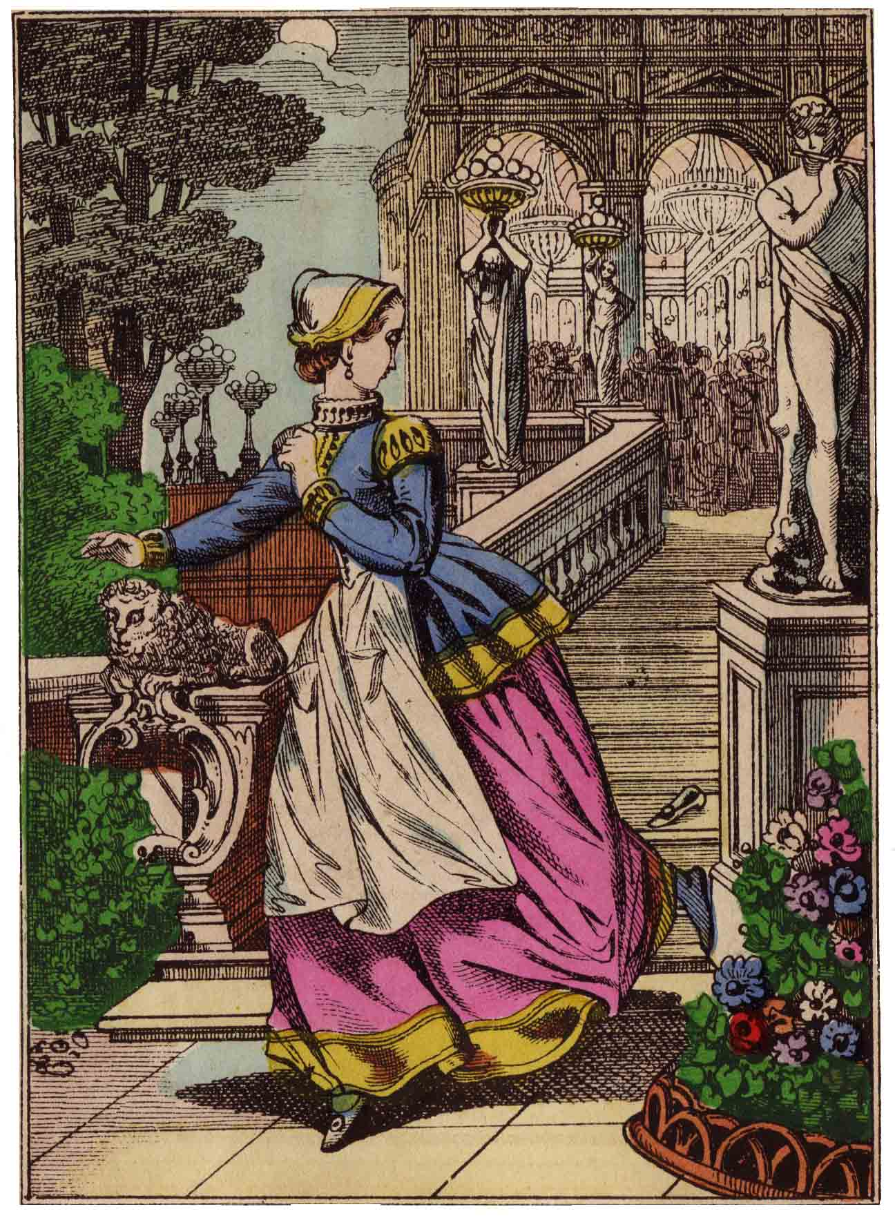 Images d'Épinal : Cendrillon